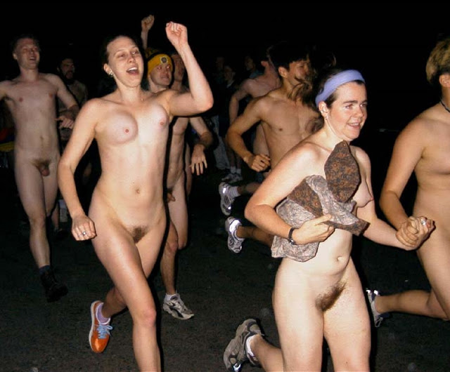 naked mile at Harvard University